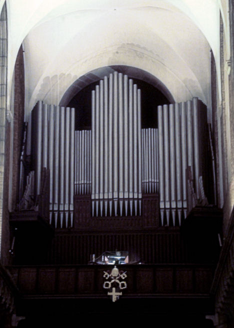 Organy Archikatedry Wrocławskiej